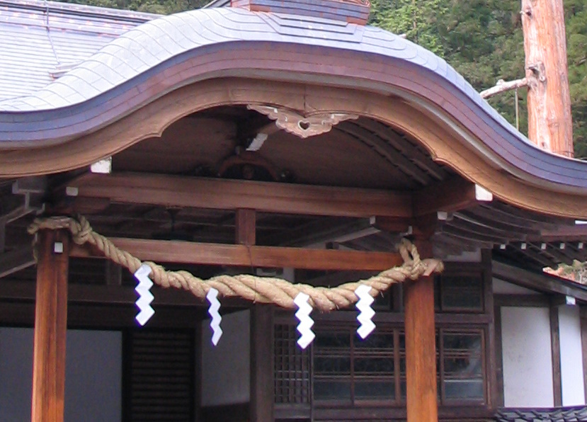 Puerta de santuario con una shimenawa con varios shide, Nikkō (Tochigi), Japón.